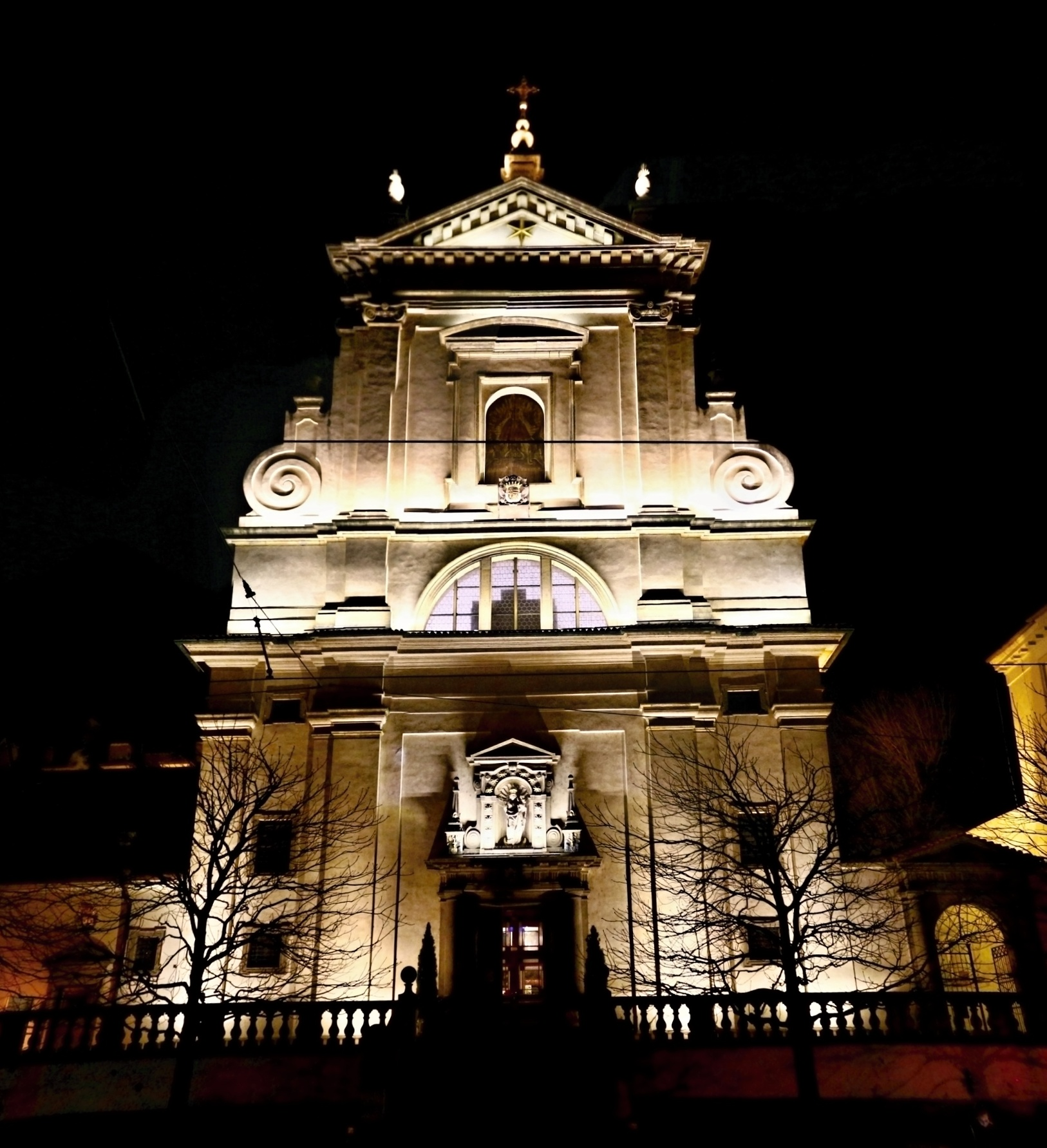 Kostel Panny Marie Vítězné a sv. Antonína Paduánského na Malé Straně v Praze